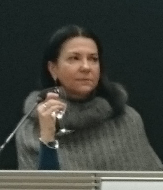 Mme Michèle Coninsx, alors présidente d'Eurojust, lors d'une conférence en janvier 2016.